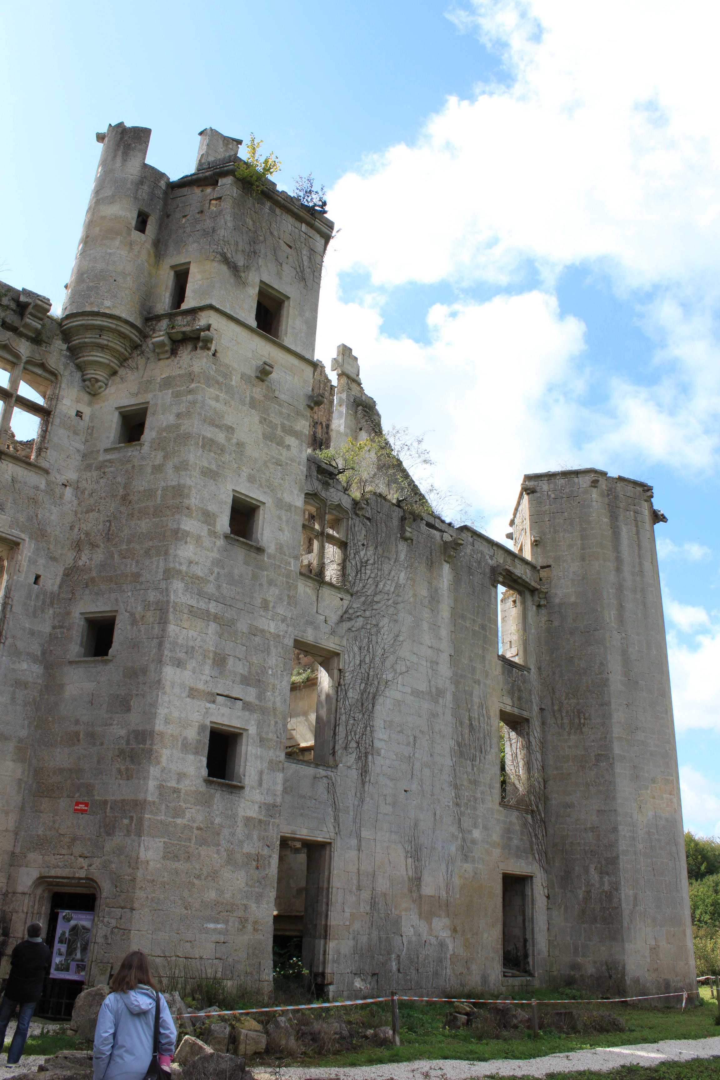 Chateau de Rochefort, Asnières-en-Montagne, Côte-d'Or, Bourgogne, FRANCE